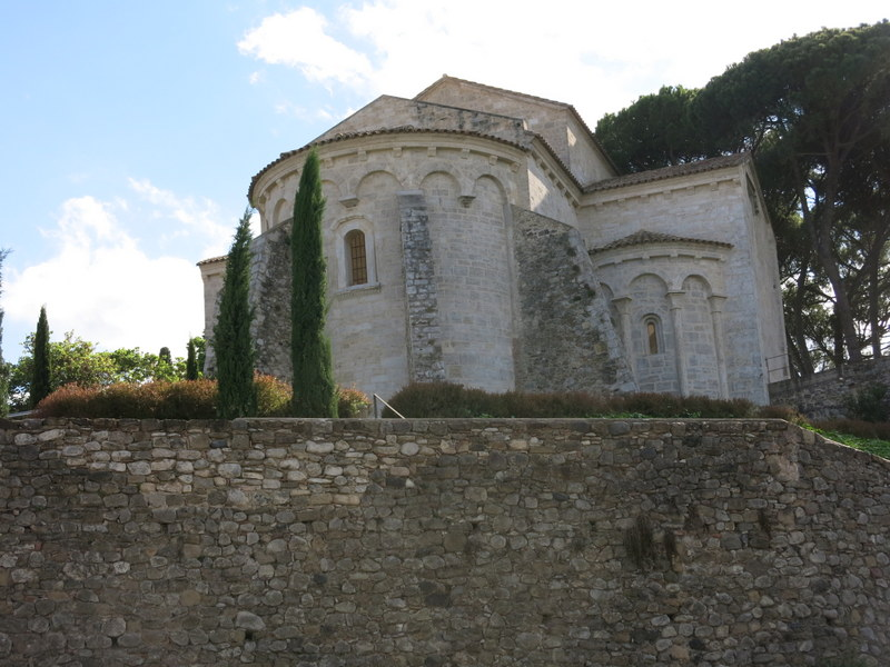 restes de la Esglèsia del castell de Besalú a la Comarca de la Garrotxa - Catalunya